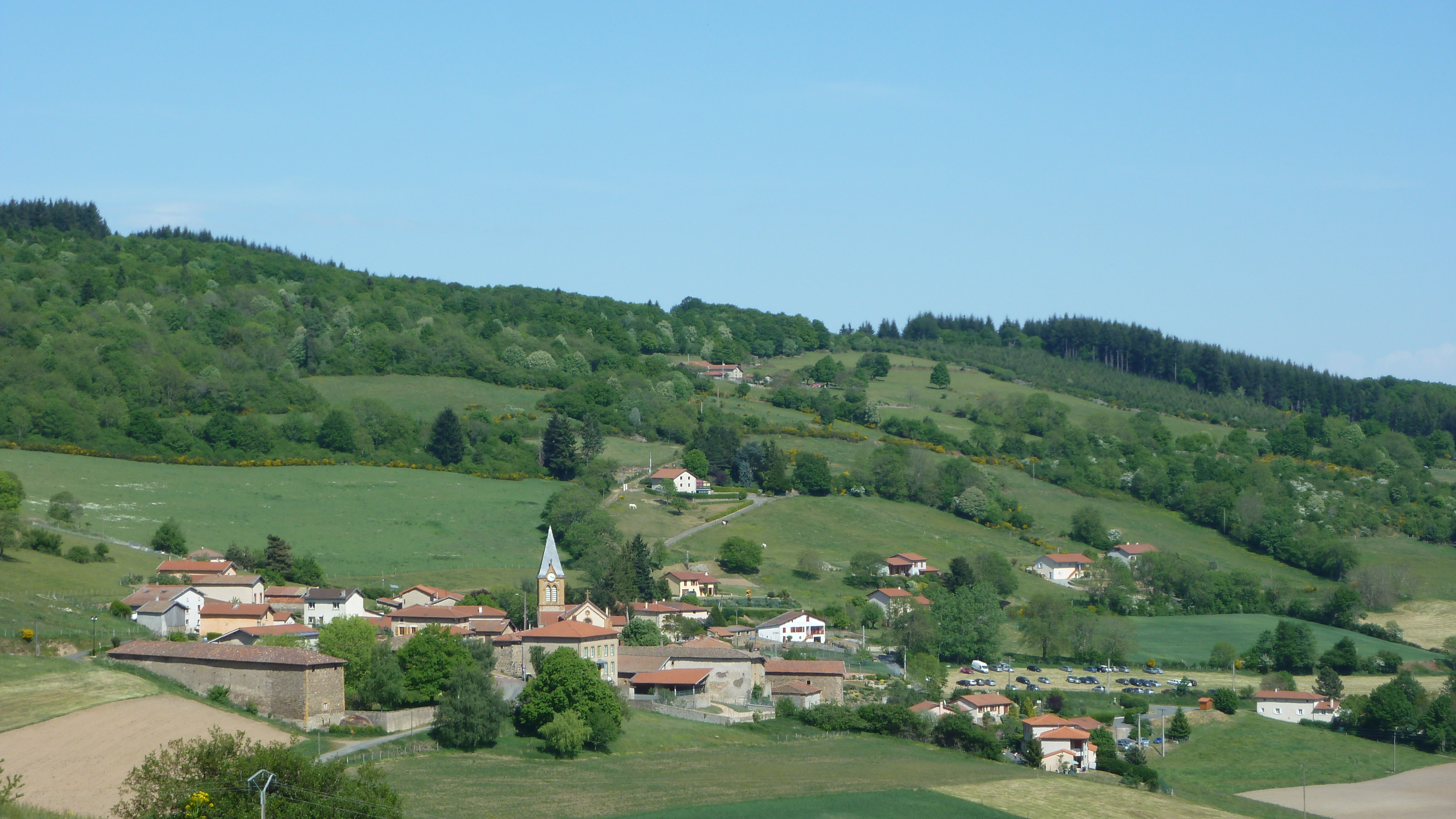 Vue sur le village d'Affoux (Rhône)